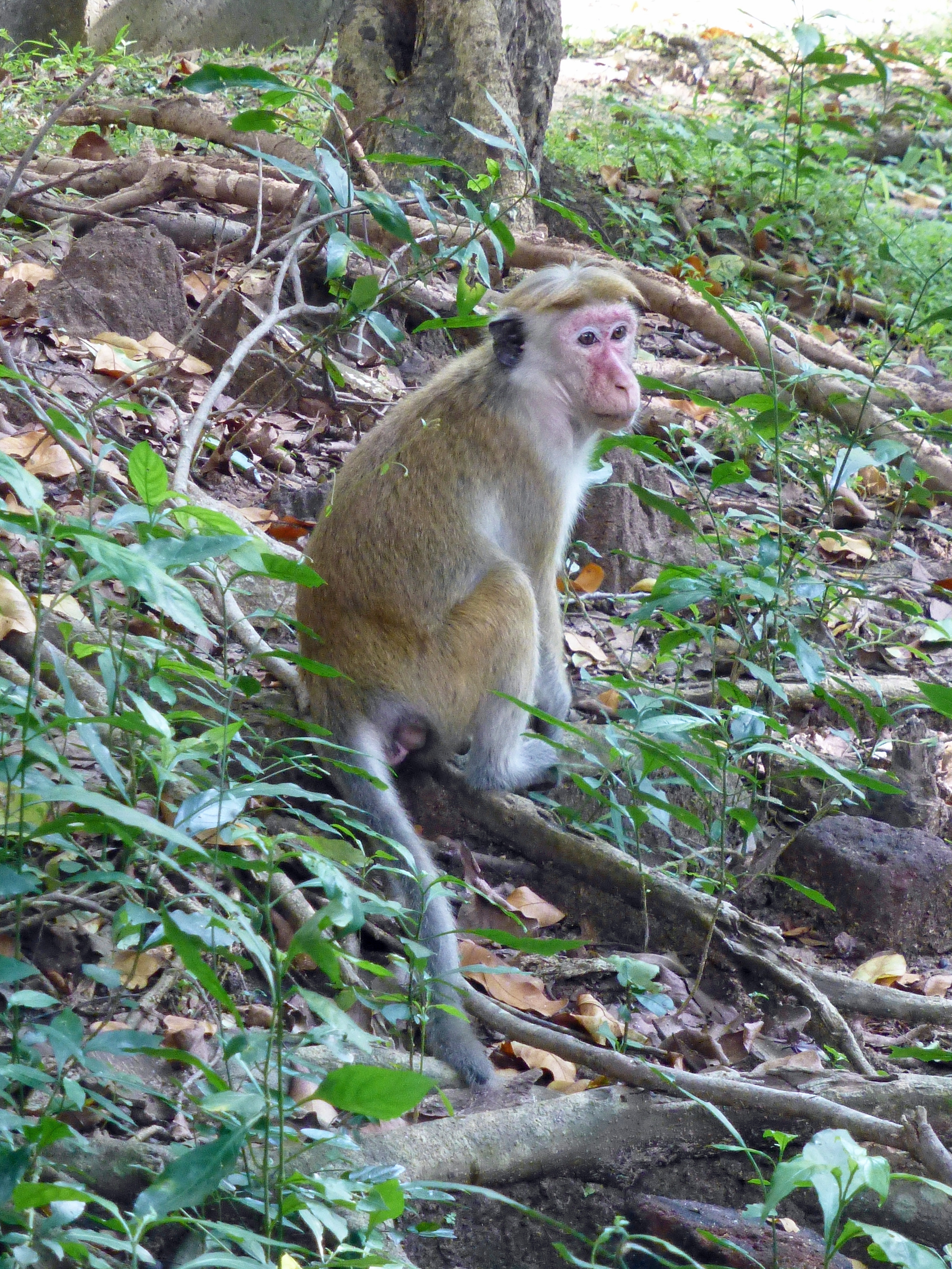 Macaca sinica, Sigiriya Village, Sri Lanka